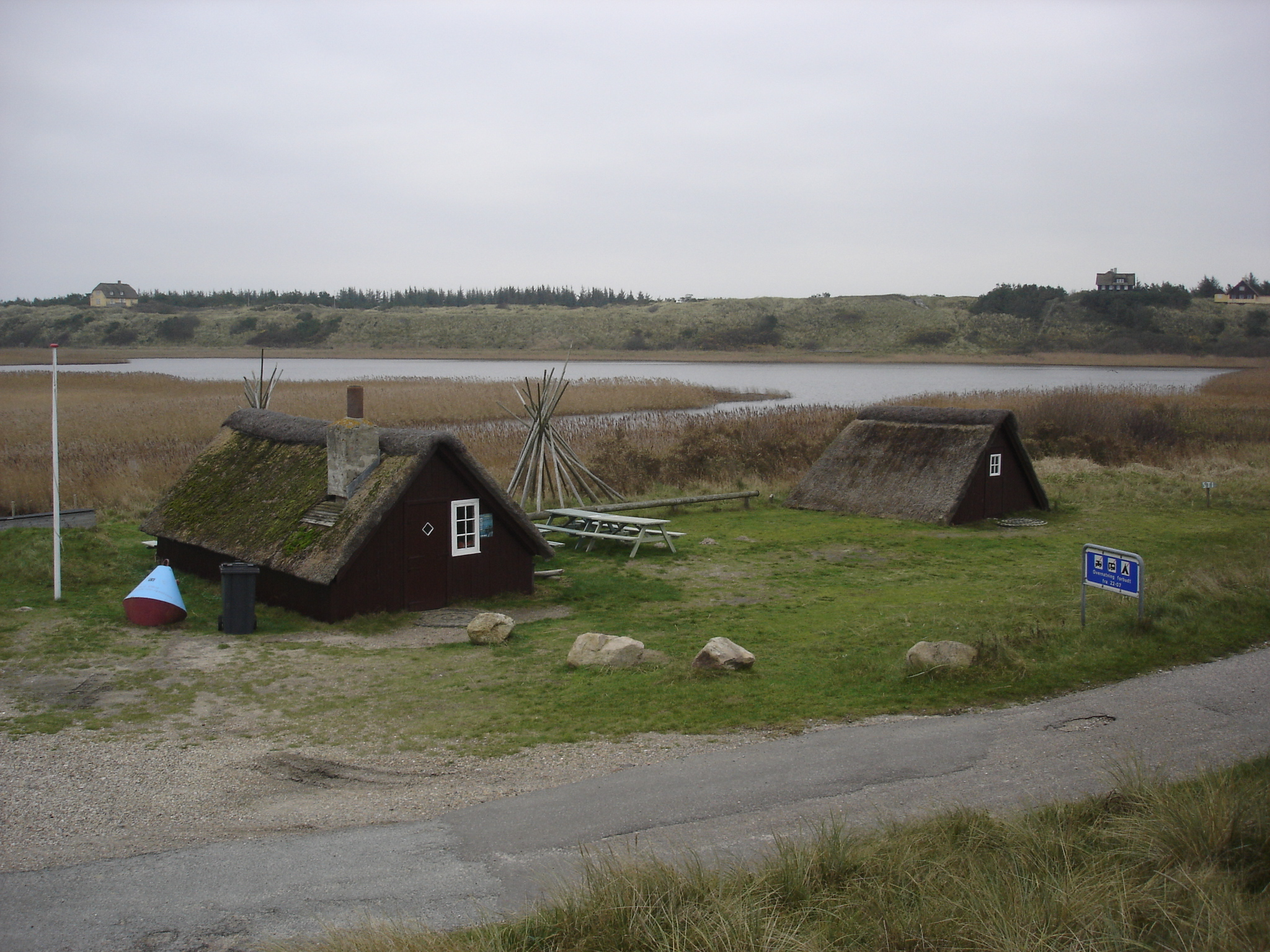 Esehusene ved Vesterhavn i Nymindegab set fra sydvest